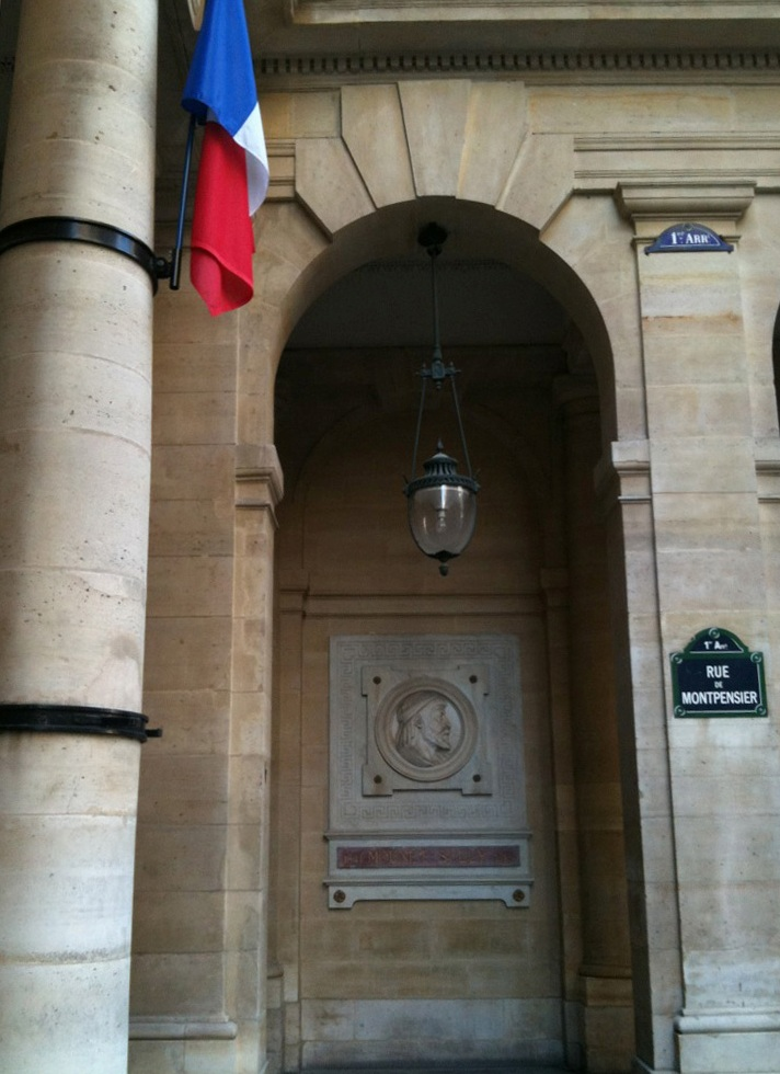 MOUNET-SULLY - Sculpted by Daniel-Joseph Bacqué (Comédie-Française - Rue de Montpensier - Paris - France)